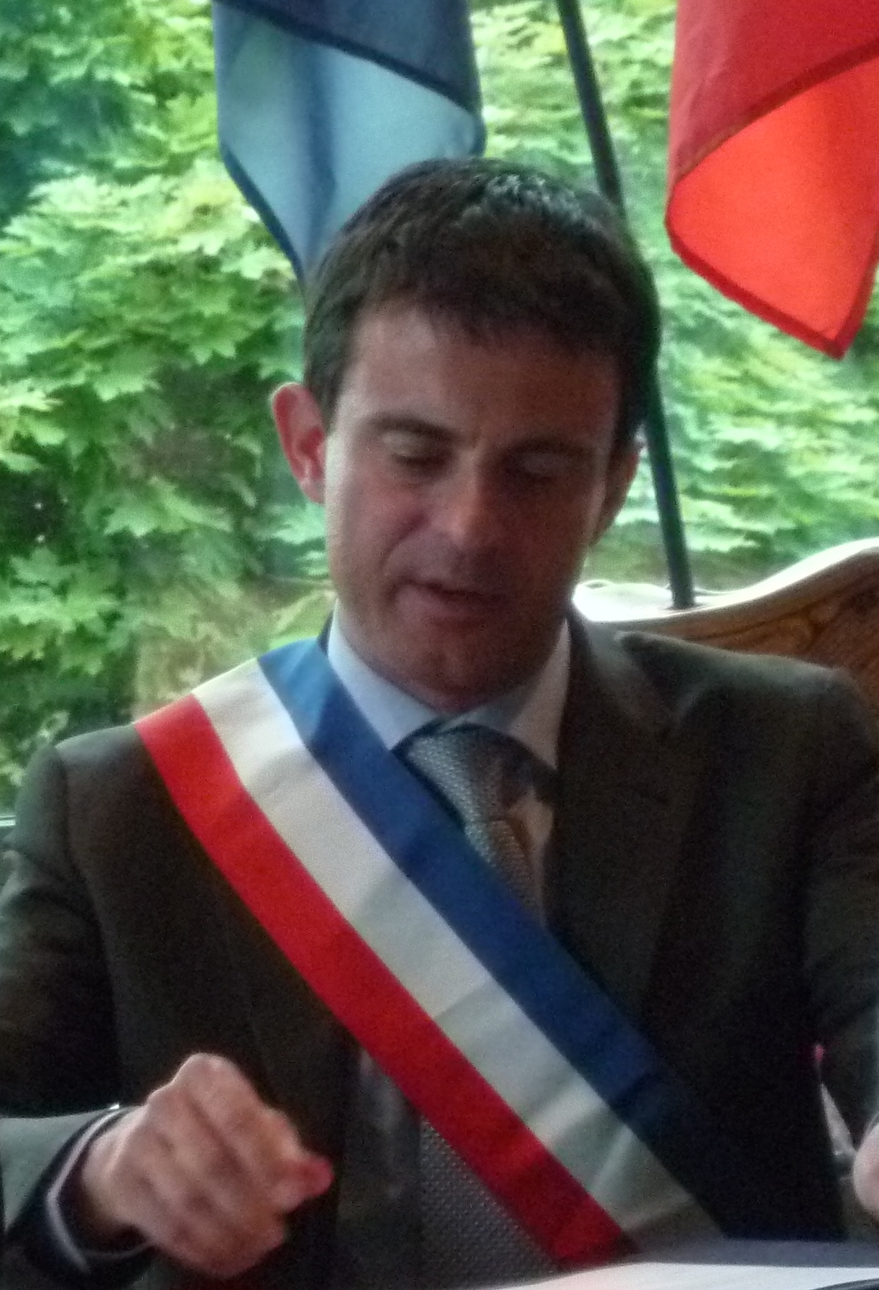 Photographie de Manuel Valls prise en Mairie d'Evry